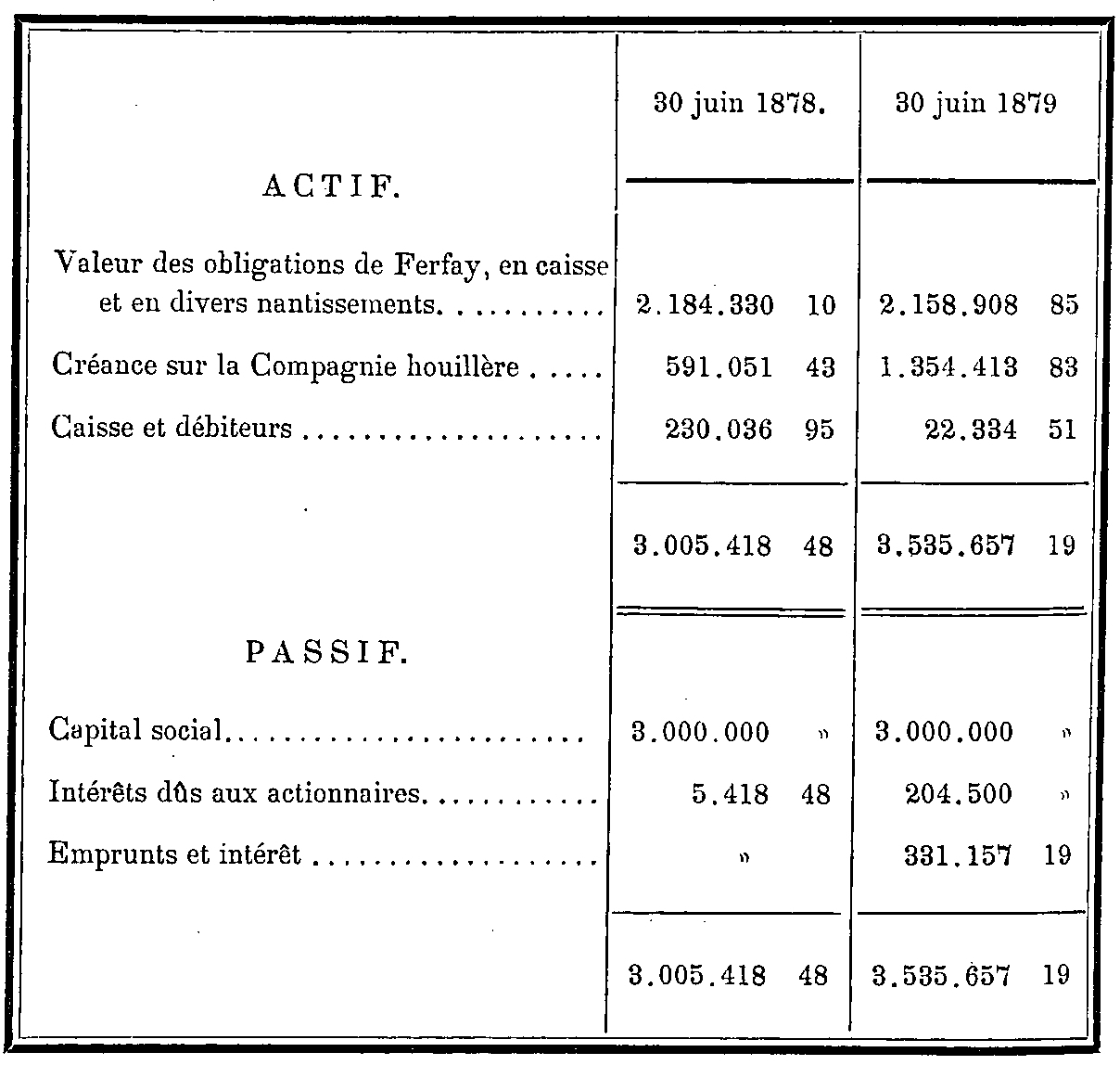 Bilans comptables aux 30 juin 1878 et 1879 de la Compagnie des mines de Ferfay.